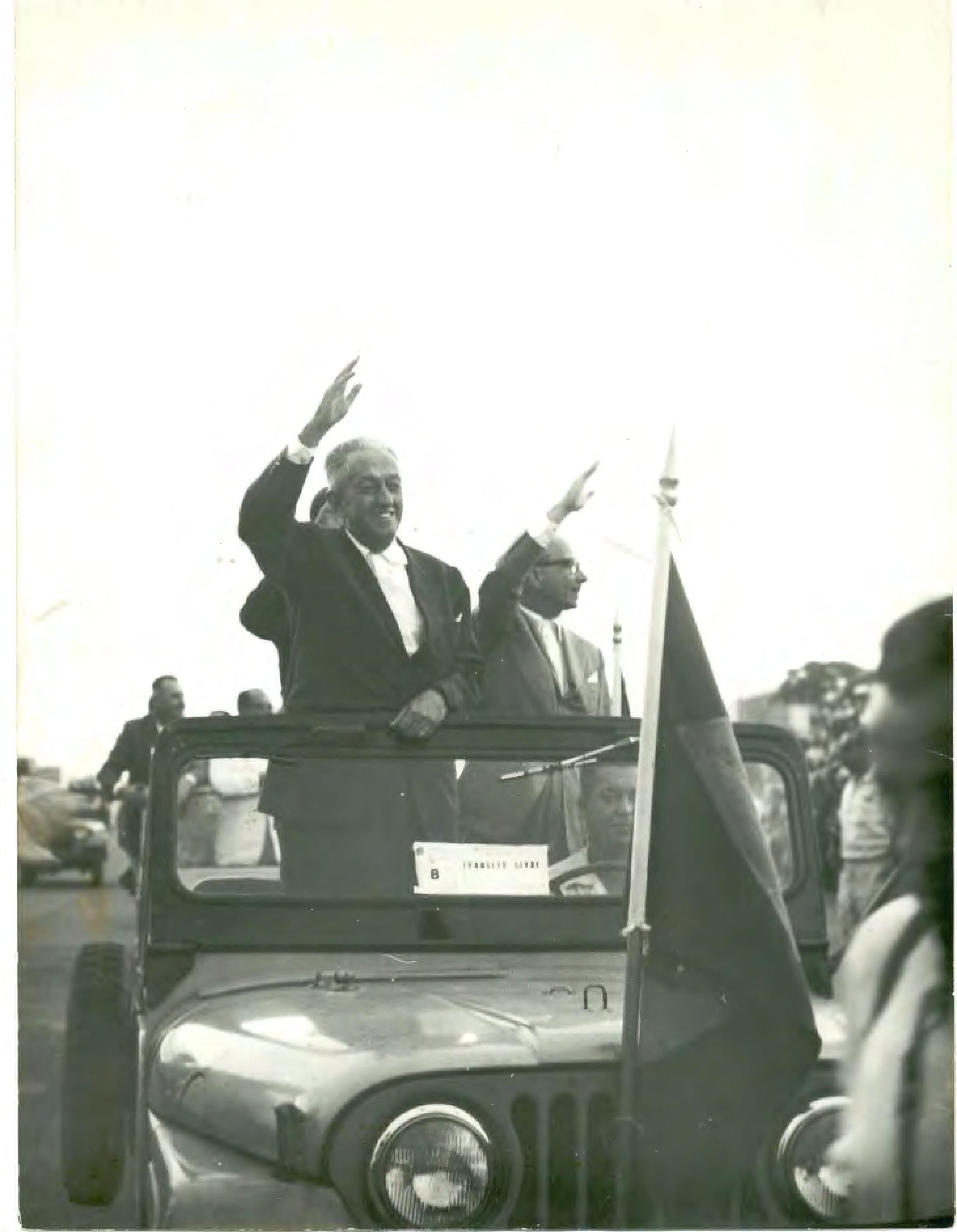 Fotografia do Fundo Correio da Manhã, sob a guarda do Arquivo Nacional.